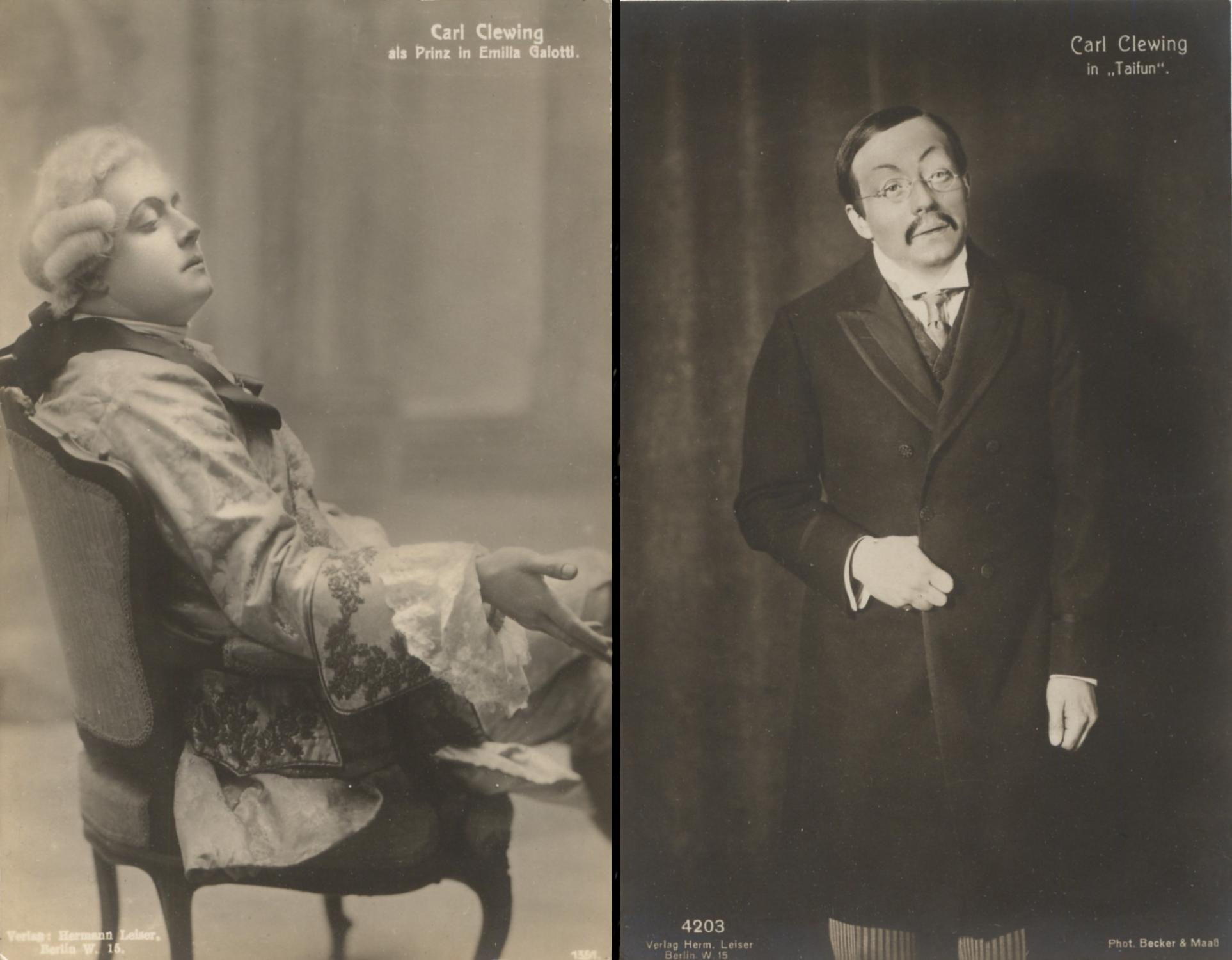 Der Schauspieler (auch Opernsänger und Musikwissenschaftler) Carl Clewing (1884-1954), als Prinz in "Emilia Gallotti" (Lessing) und in "Taifun" (von Hermann Essig), um 1920. Photopostkarten des Ateliers (Otto) Becker & (Heinrich) Maass